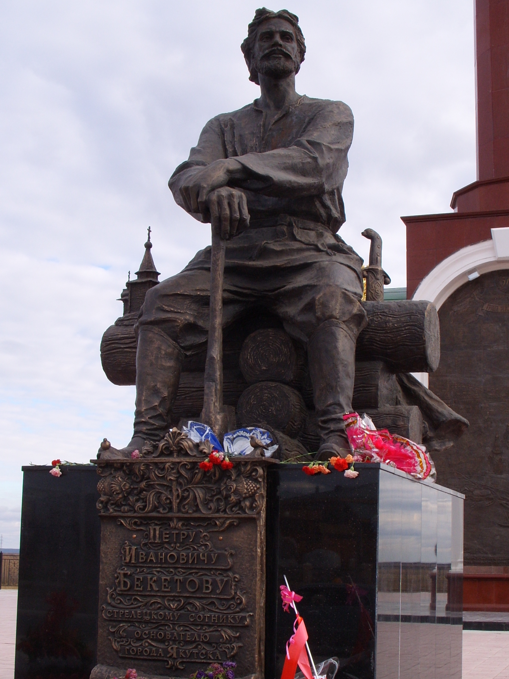 Памятник в Якутске, посвященный 375-летию вхождения Якутии в состав Российского государства. Открыт в 2007 г. Памятник Бекетову - часть комплекса. Занесен в список памятников истории и культуры, подлежащих госохране как республиканское наследие, что определено специальным постановлением правительства республики.